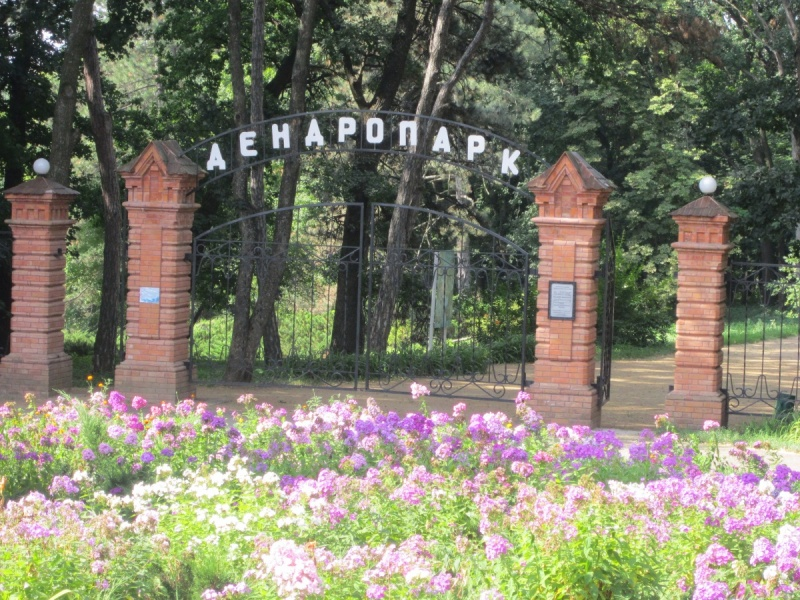 Центральний вхід до парку